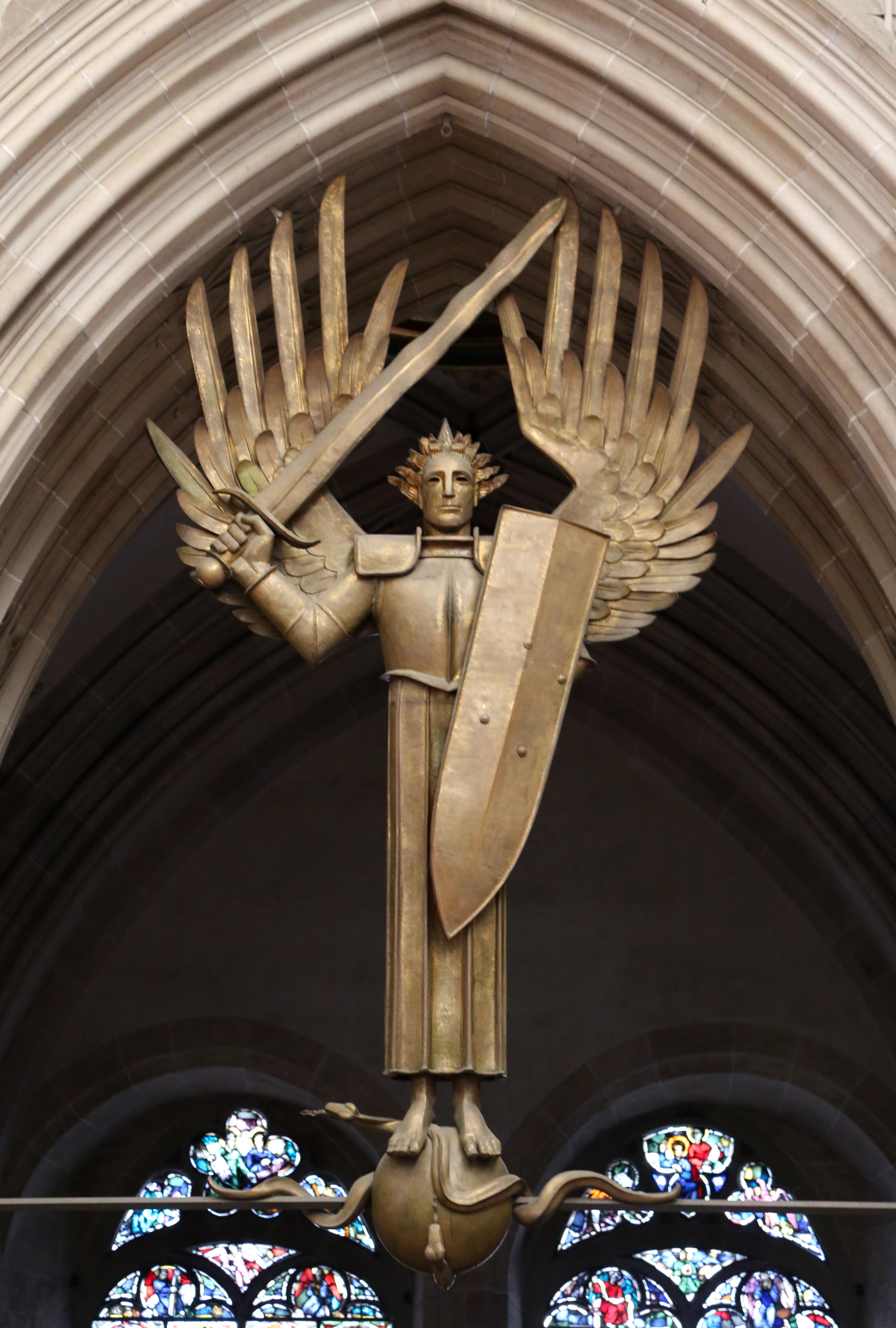 Engel, Ulmer Münster